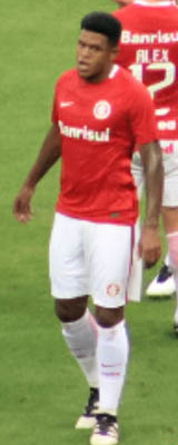 Inter X Cruzeiro pelo Brasileirão de 2016